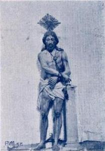 "Imagem do Senhor dos Terceiros", freguesia e concelho de Vila do Porto, ilha de Santa Maria, Açores, in Álbum Açoriano, fascículo nº 33, 1903, p. 259.